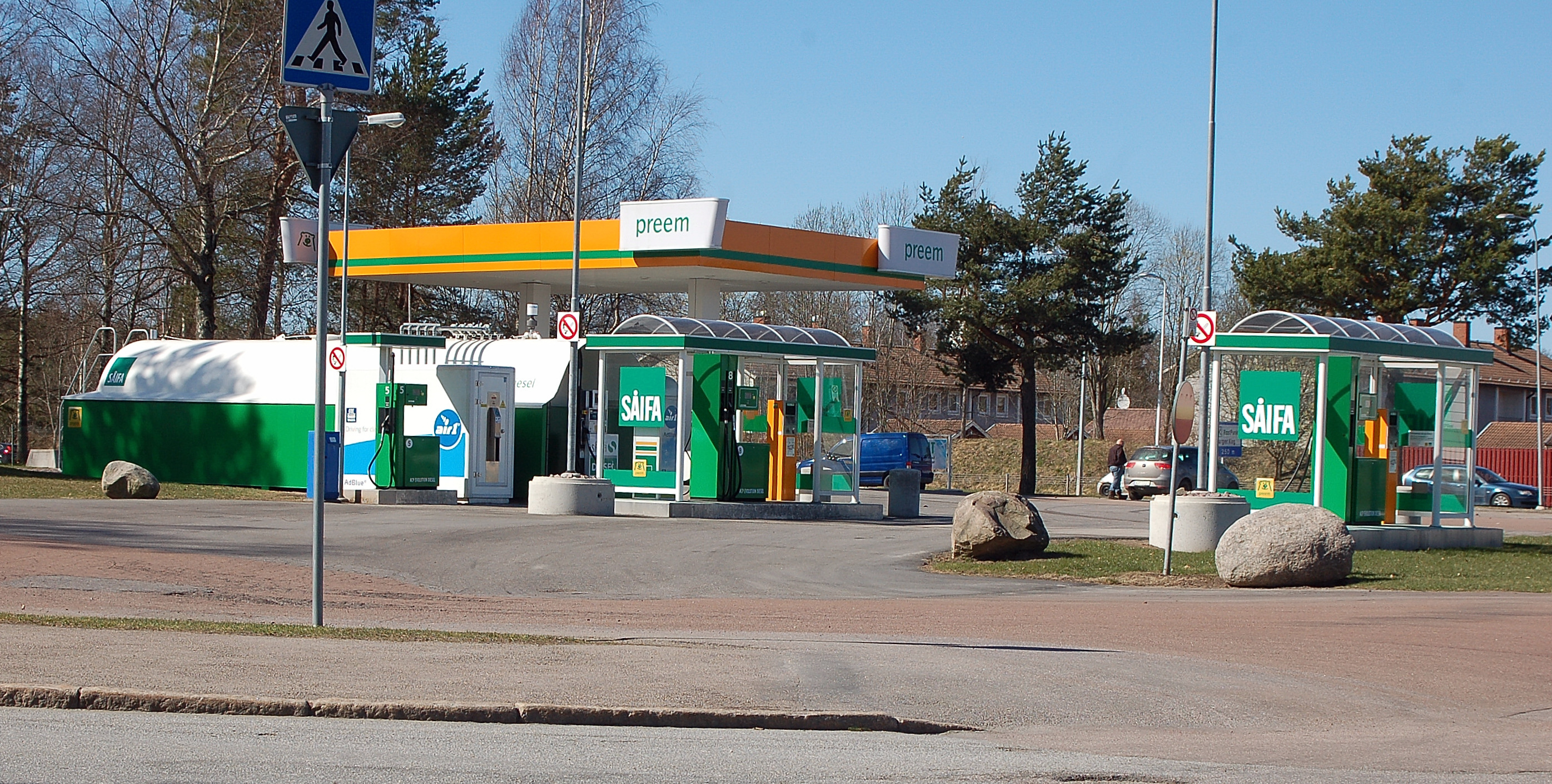 SÅIFA och Preems drivmedelsanläggning i Laxå